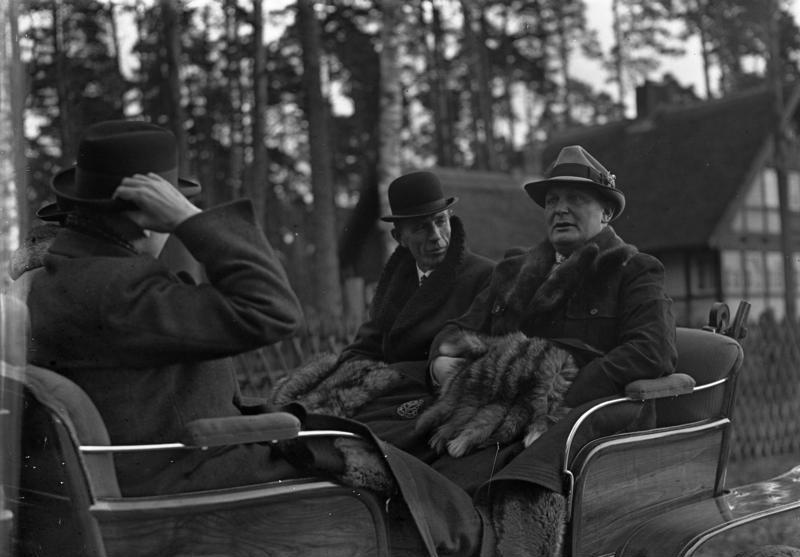 Lord [Edward Frederik ]Halifax bei Göring in der Schorfheide 20.11.37